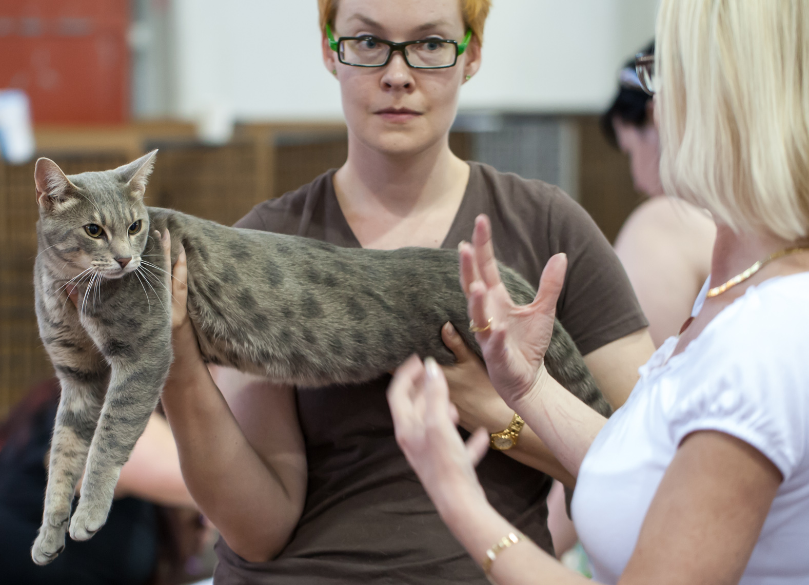 Un ocicat présenté à l'exposition féline FIFé de Hyvinkää en Finlande. Couleur : Spotted tabby bleu